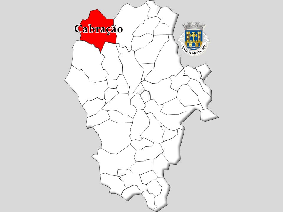 Censos 1864/2011